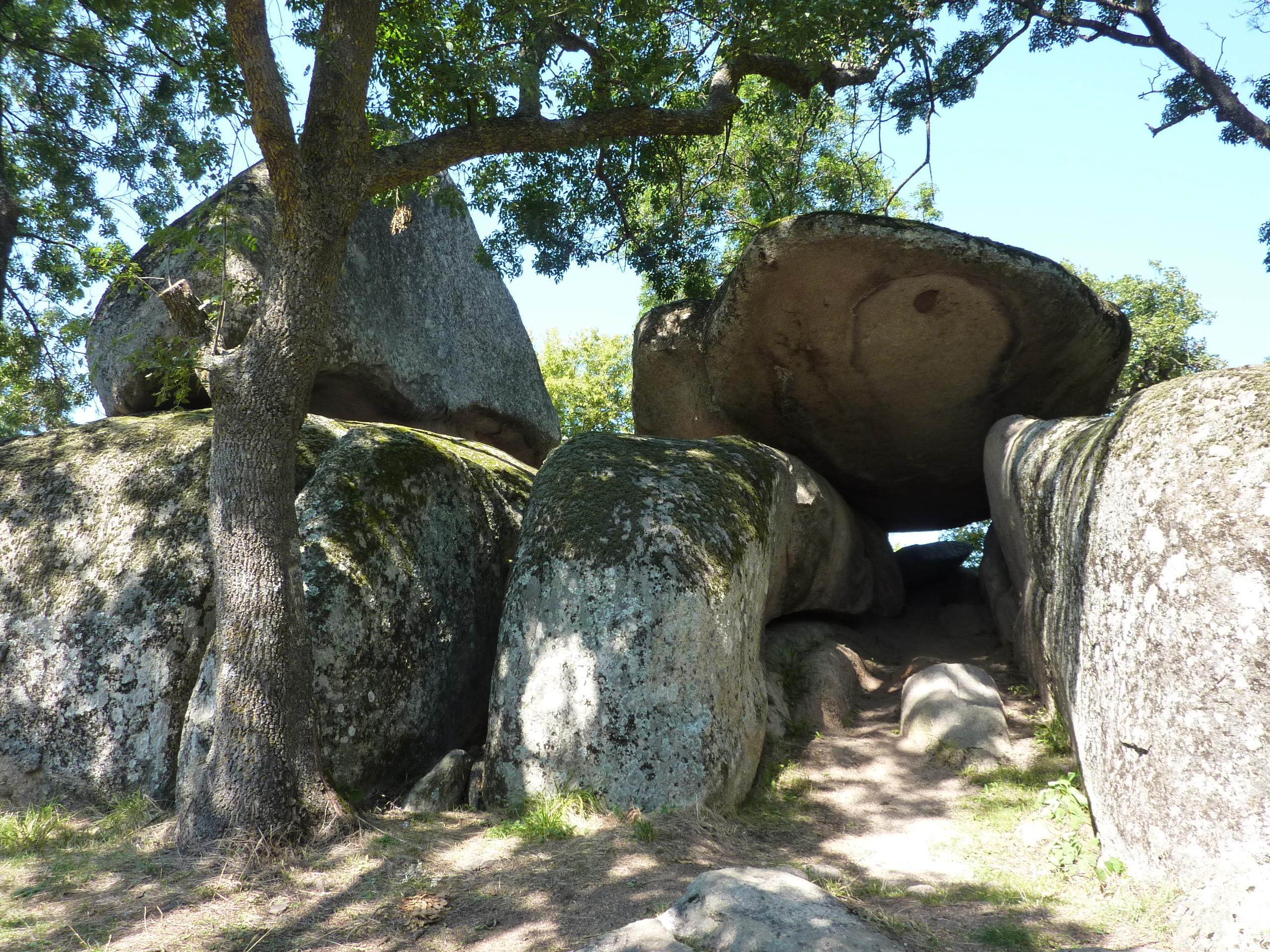 Beglik Tash